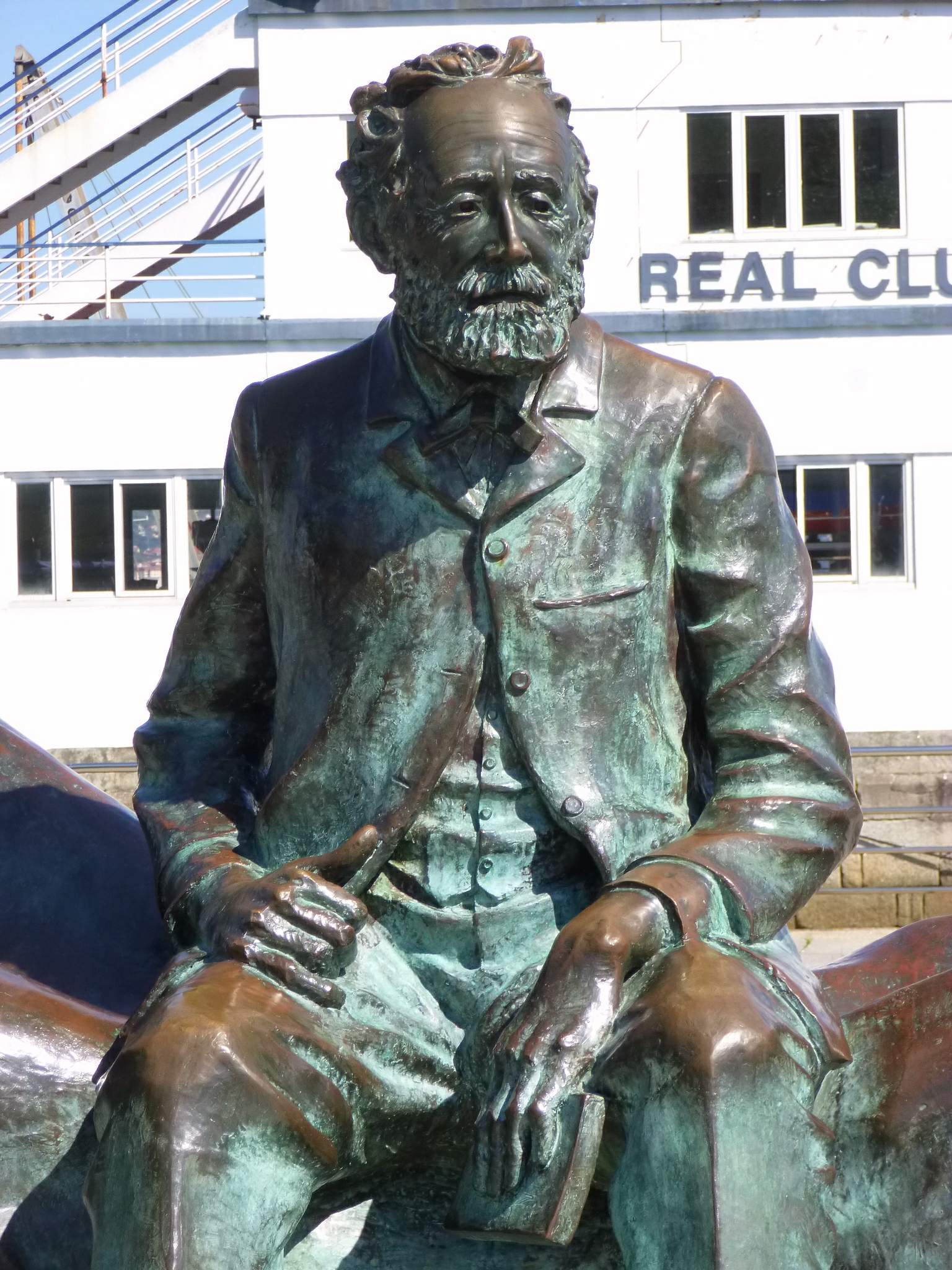 Vigo - Monumento a Julio Verne